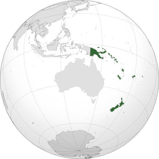 OFC orthographic projection Mapa OFC